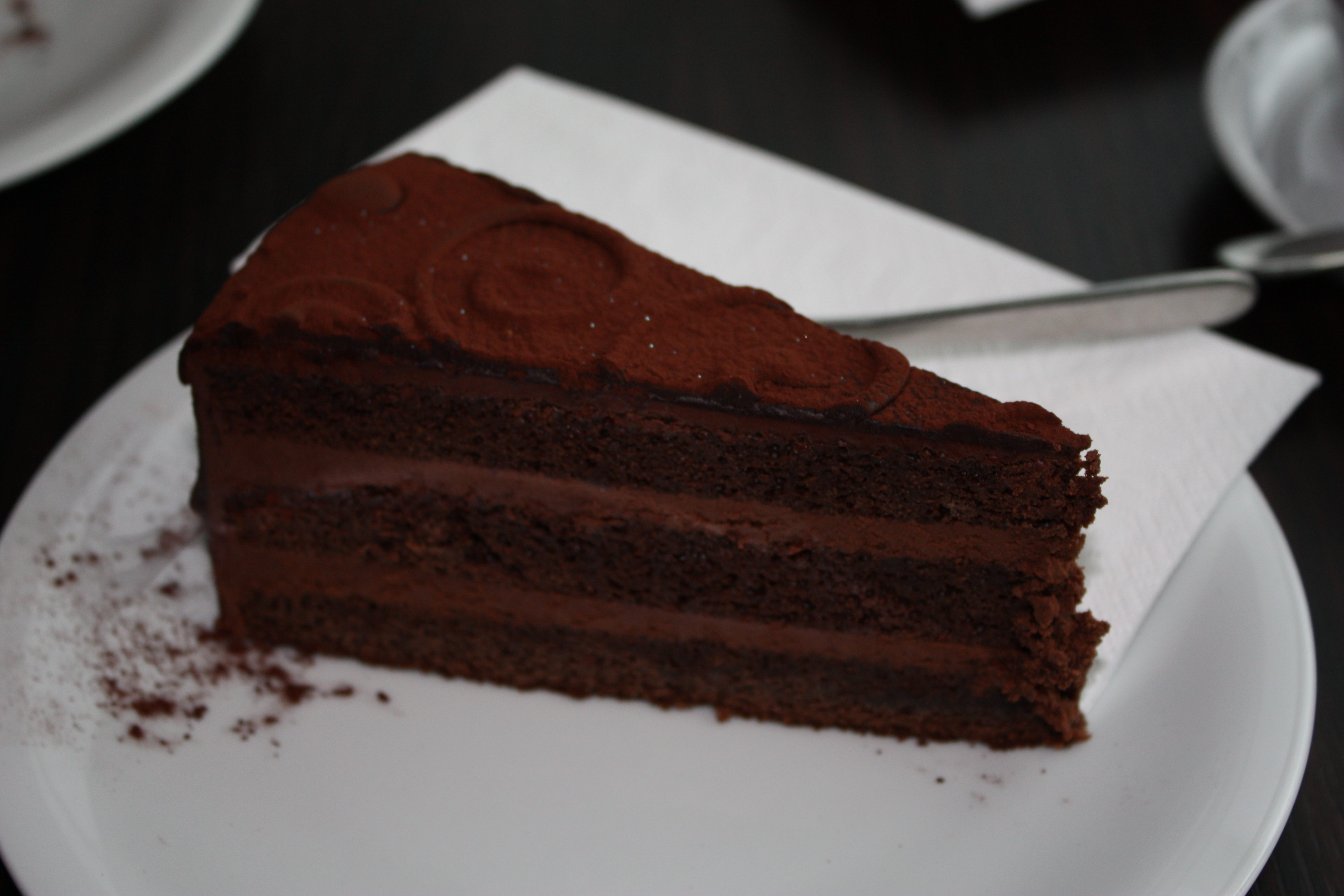 Köln, März 2009; Schokoladentorte im Schokoladenmuseum Köln; Dreikönigstorte